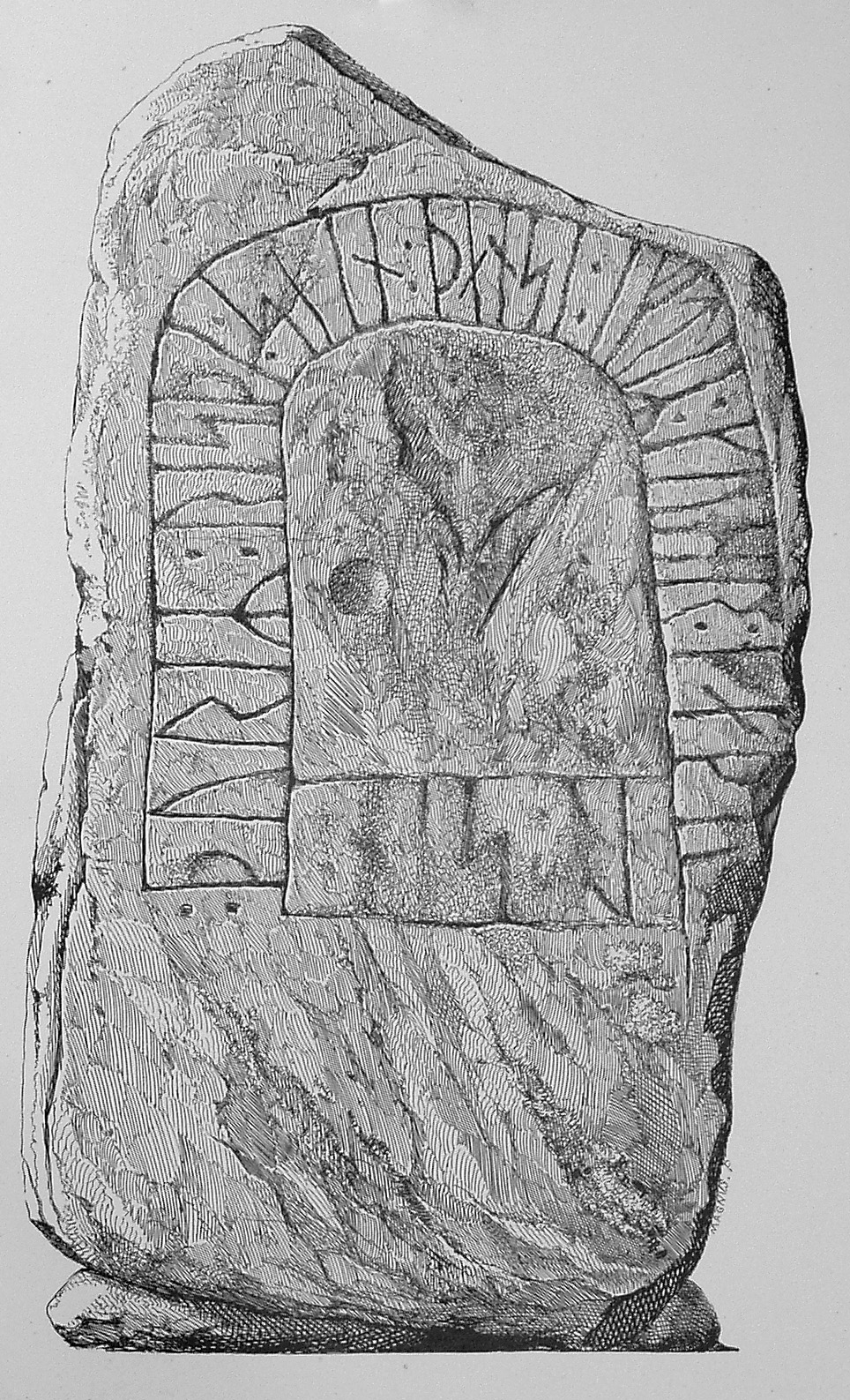 Glenstrup-stenen 1 er en runesten, fundet på kirkegården i Glenstrup i Mariagerfjord Kommune. Stenen findes i dag på Nationalmuseet.